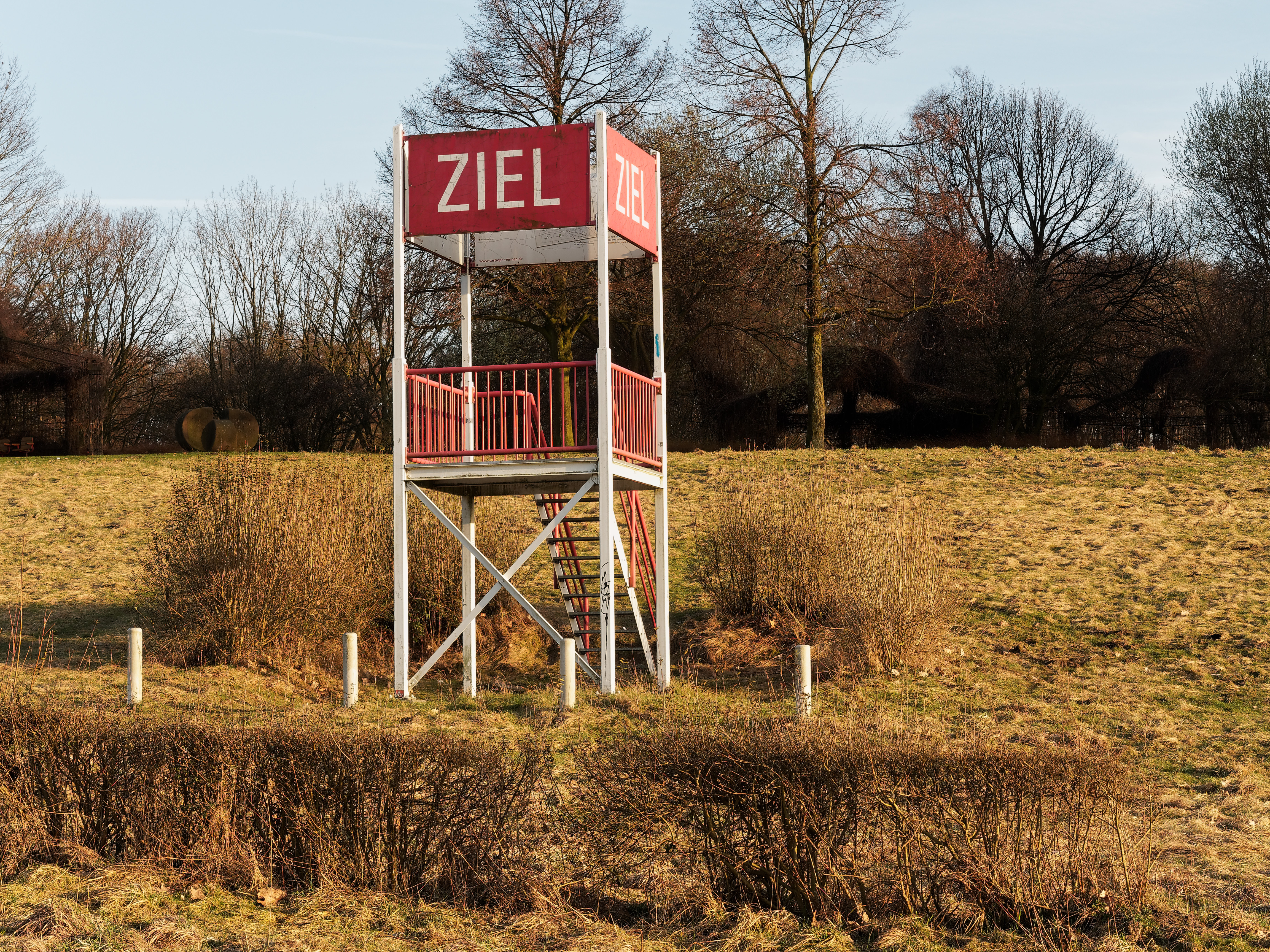 Die Naturhindernis-Pferderennbahn in Castrop an der Dortmunder Straße, Ziel, Turm nachgebaut (ohne Dach). Denkmal